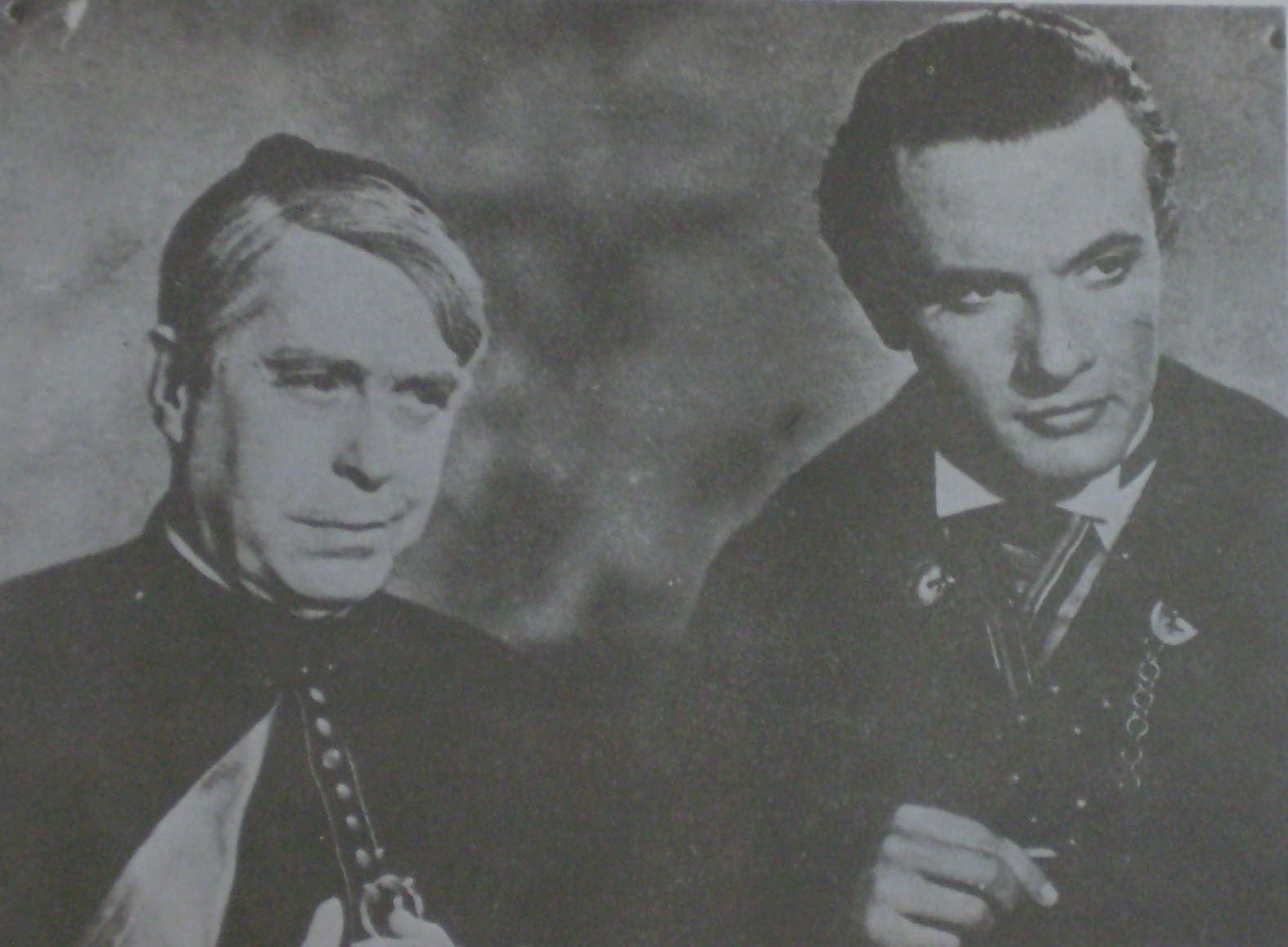 Ernesto Vilches y Ricardo Passano